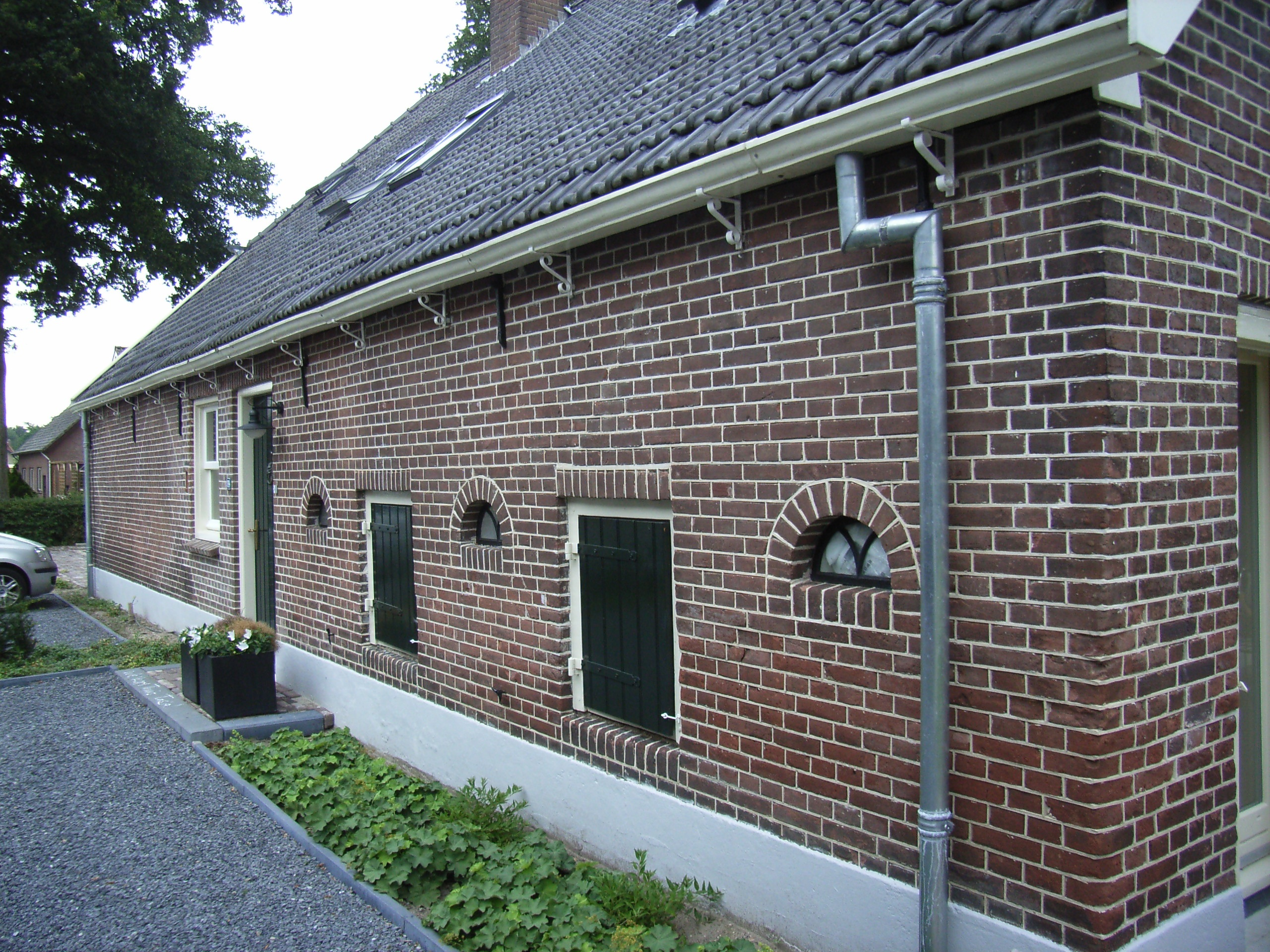 Gietijzeren dakgoot boerderij Harderwijkerweg Nunspeet